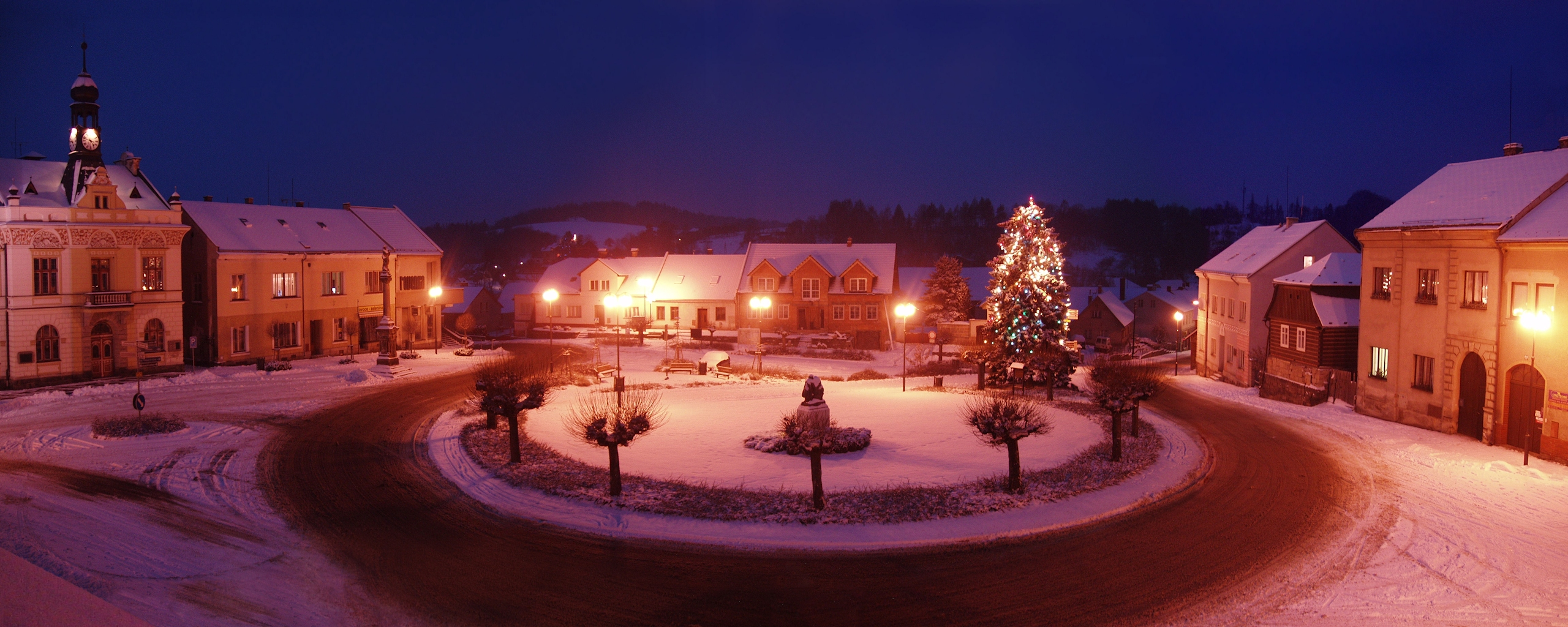 Rovenské náměstí v lednu roku 2008.